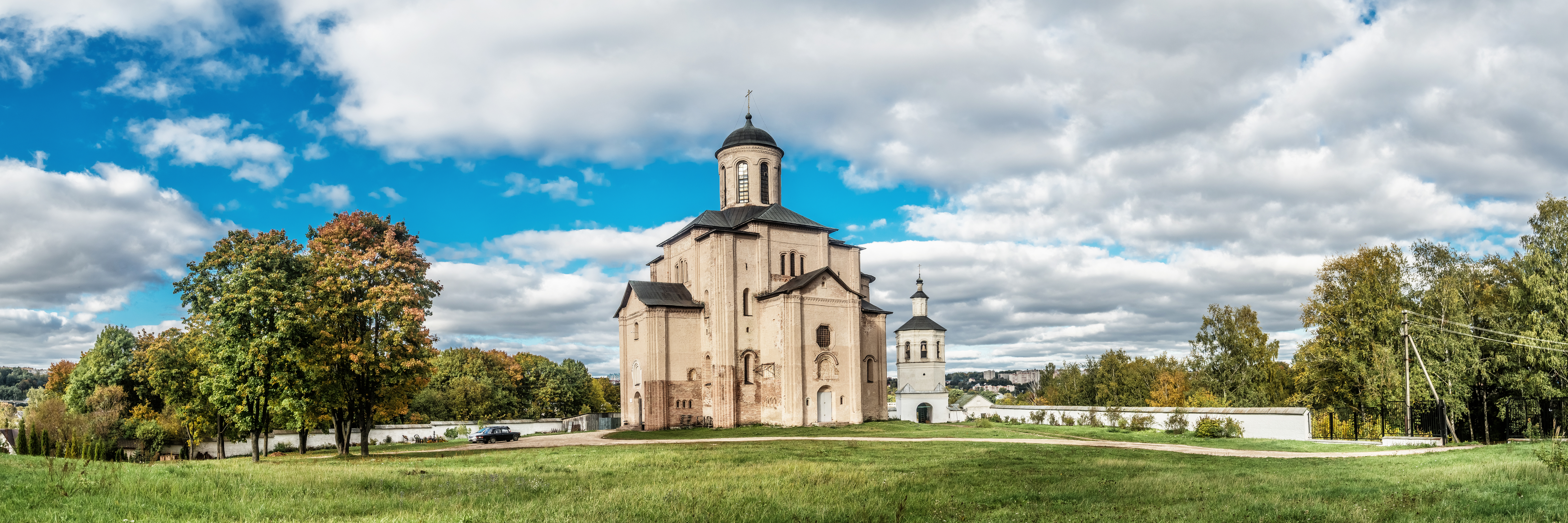 Ансамбль церкви Михаила Архангела (Свирской) (Церковь Михаила Архангела (Свирская) и колокольня): улица Парковая, Смоленск, Смоленский район, Смоленская область